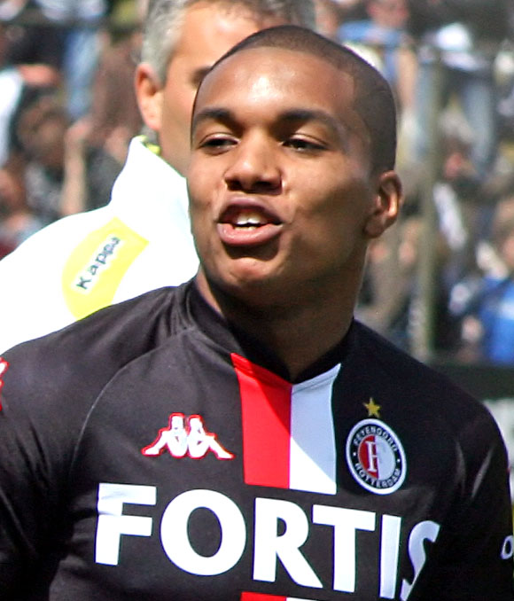 Diego Biseswar (Feyenoord)